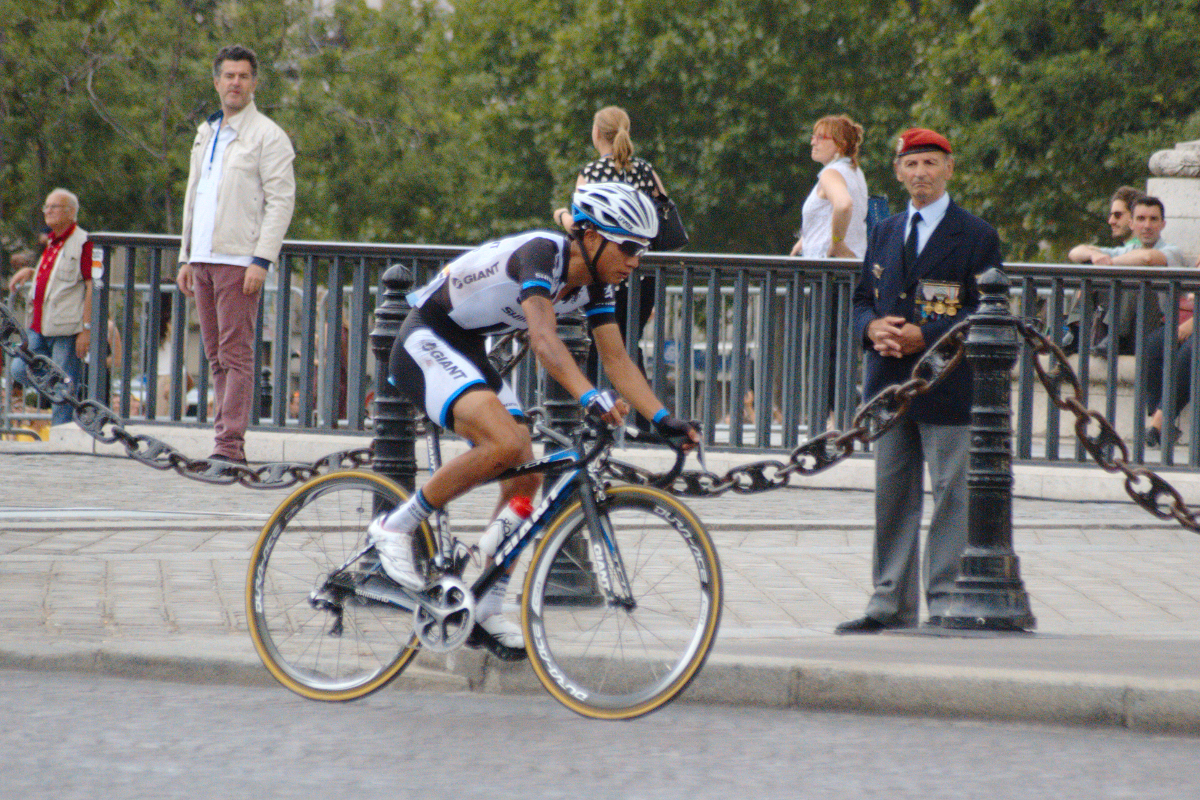 21è étape du Tour de France 2014, Evry-Paris Champs Elysées, photo prise à Paris au pied de l'Arc de Triomphe.